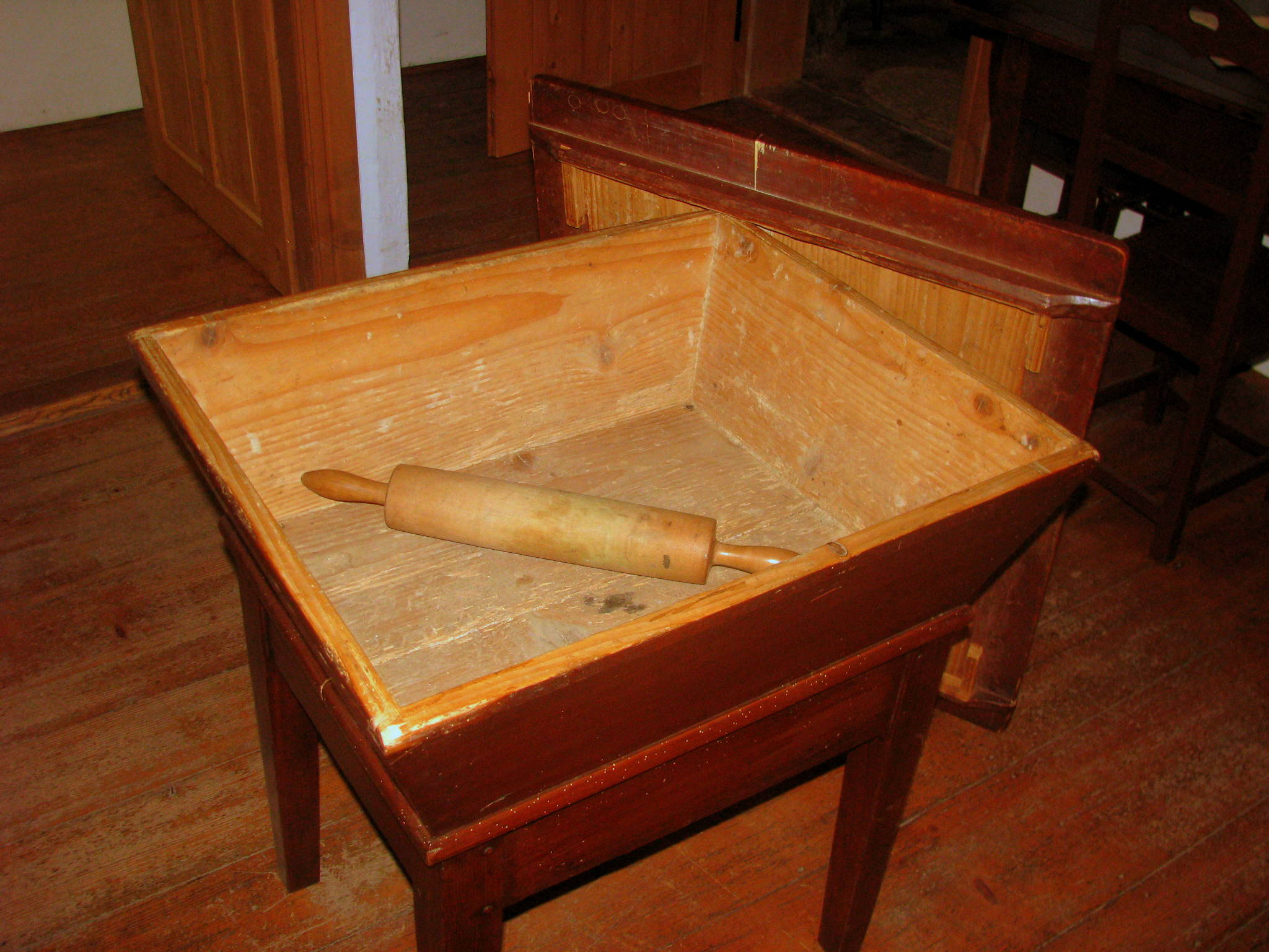 Cankar memorial house, Vrhnika, Slovenia